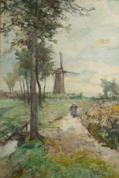 Polderlandschap door Paul Gabriël